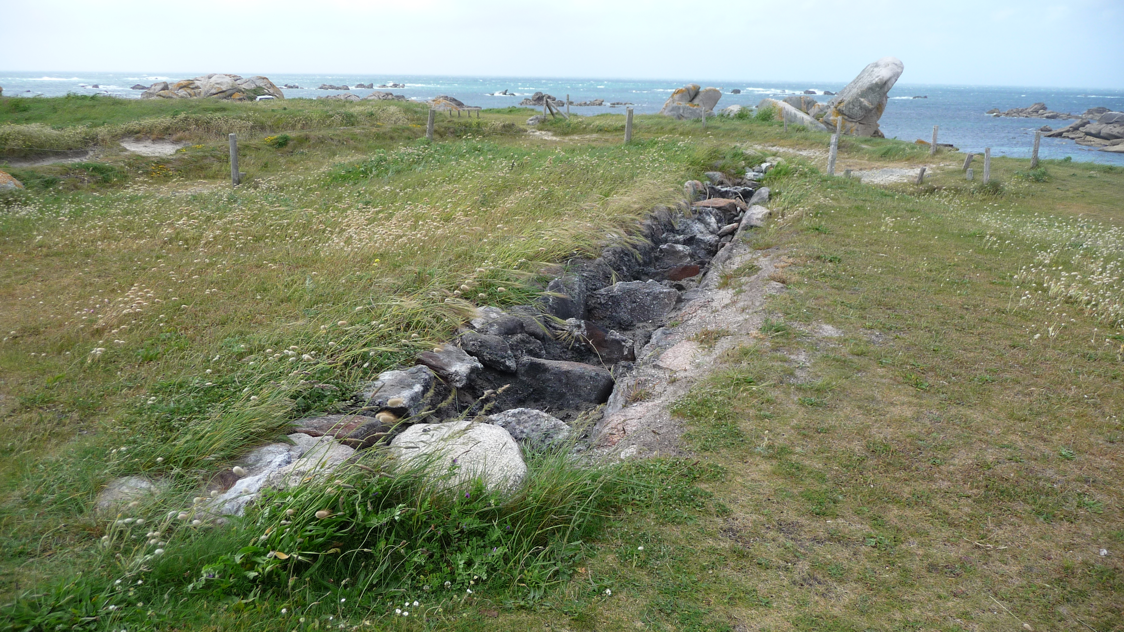 Kerlouan : le four à soude de Meneham (on y brûlait du goémon)